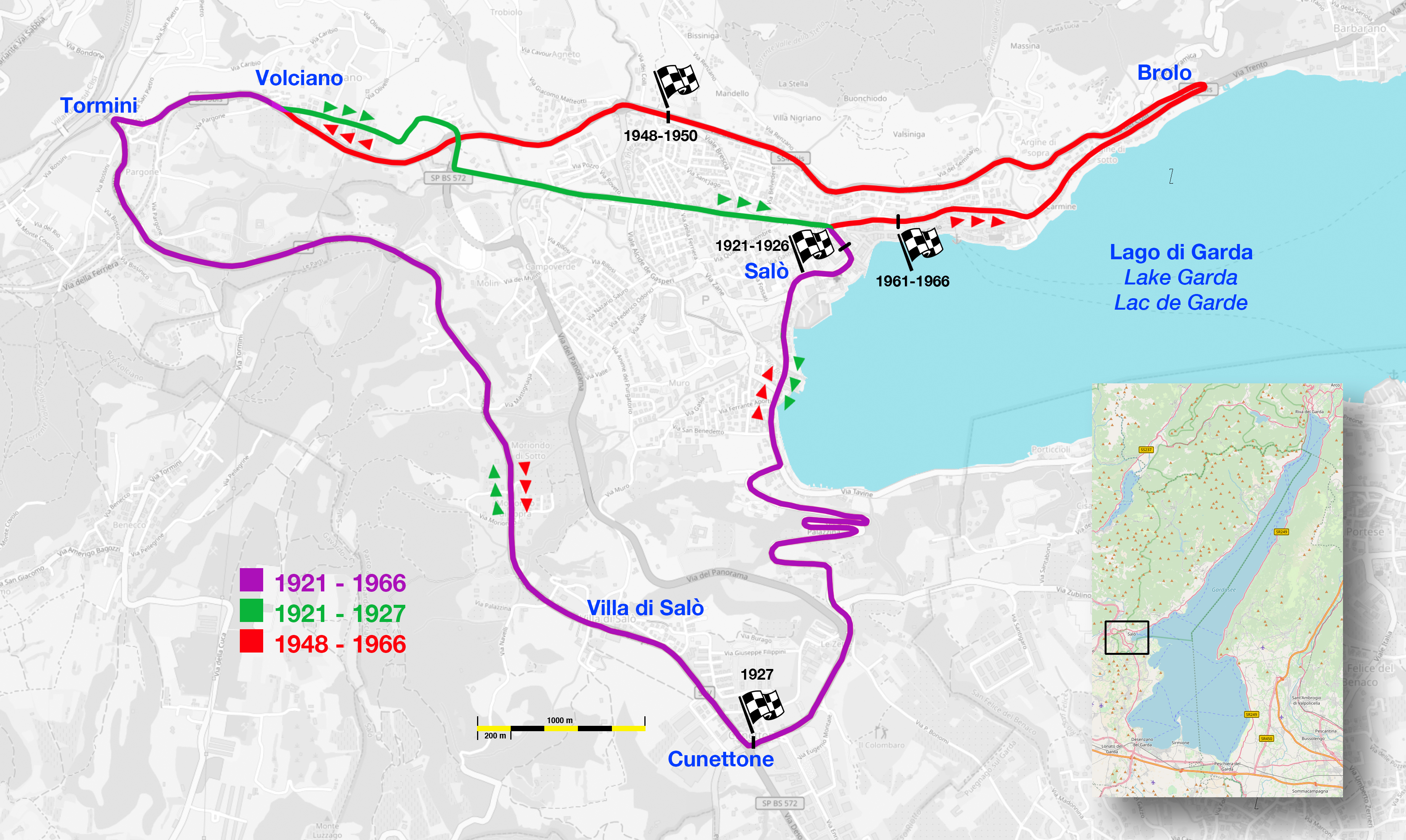 Streckenverlauf des "Circuito del Garda" von 1921 bis 1966, aufgebaut auf einer Karte von openstreetmap